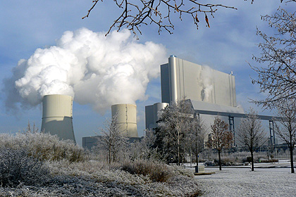 Vattenfall Kraftwerk Schwarze Pumpe im Winter